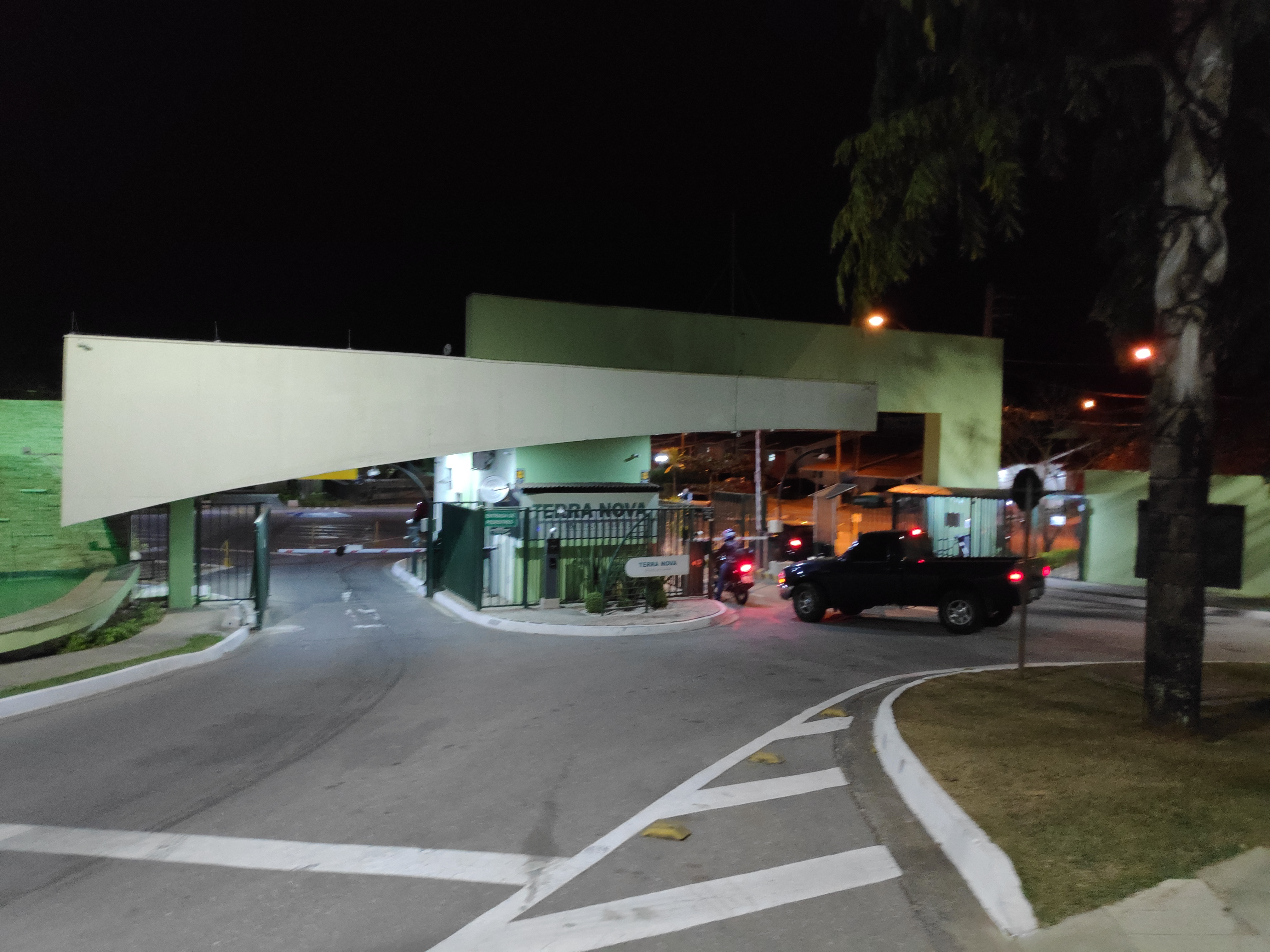 Foto Noturna da entrada do condomínio Residencial Terra Nova, Eugênio de Melo, São José dos Campos, SP, Brasil